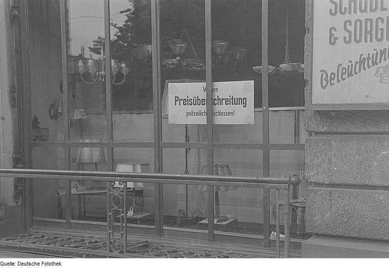 Original image description from the Deutsche Fotothek Polizeiplakat im Schaufenster eines Lampenladens